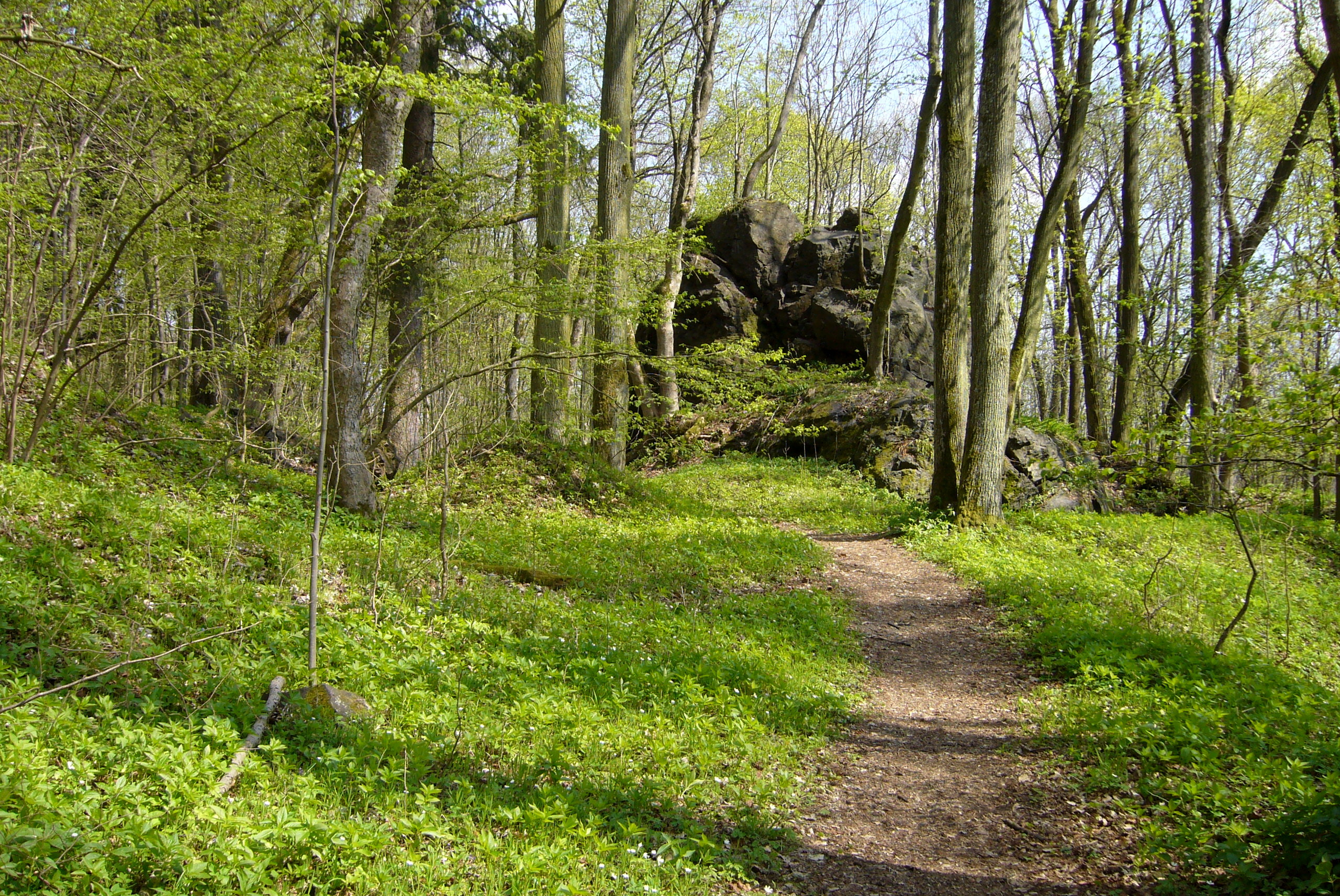 Lopata – skalisko v předhradí se zbytky čtverhranné věže